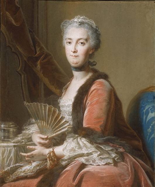 Depicted person: Anne Marie Louise Nicole de Lamoignon de Malesherbes, Countess of Sénozan